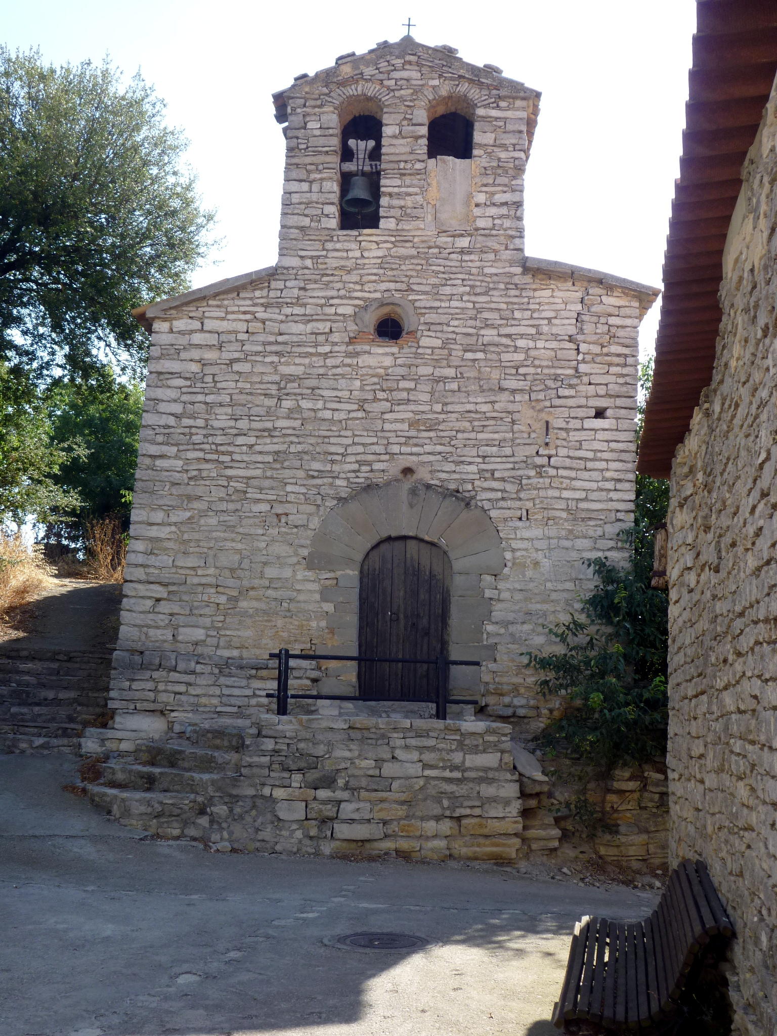 Església de Santa Maria del Castell (Sant Guim de Freixenet), façana